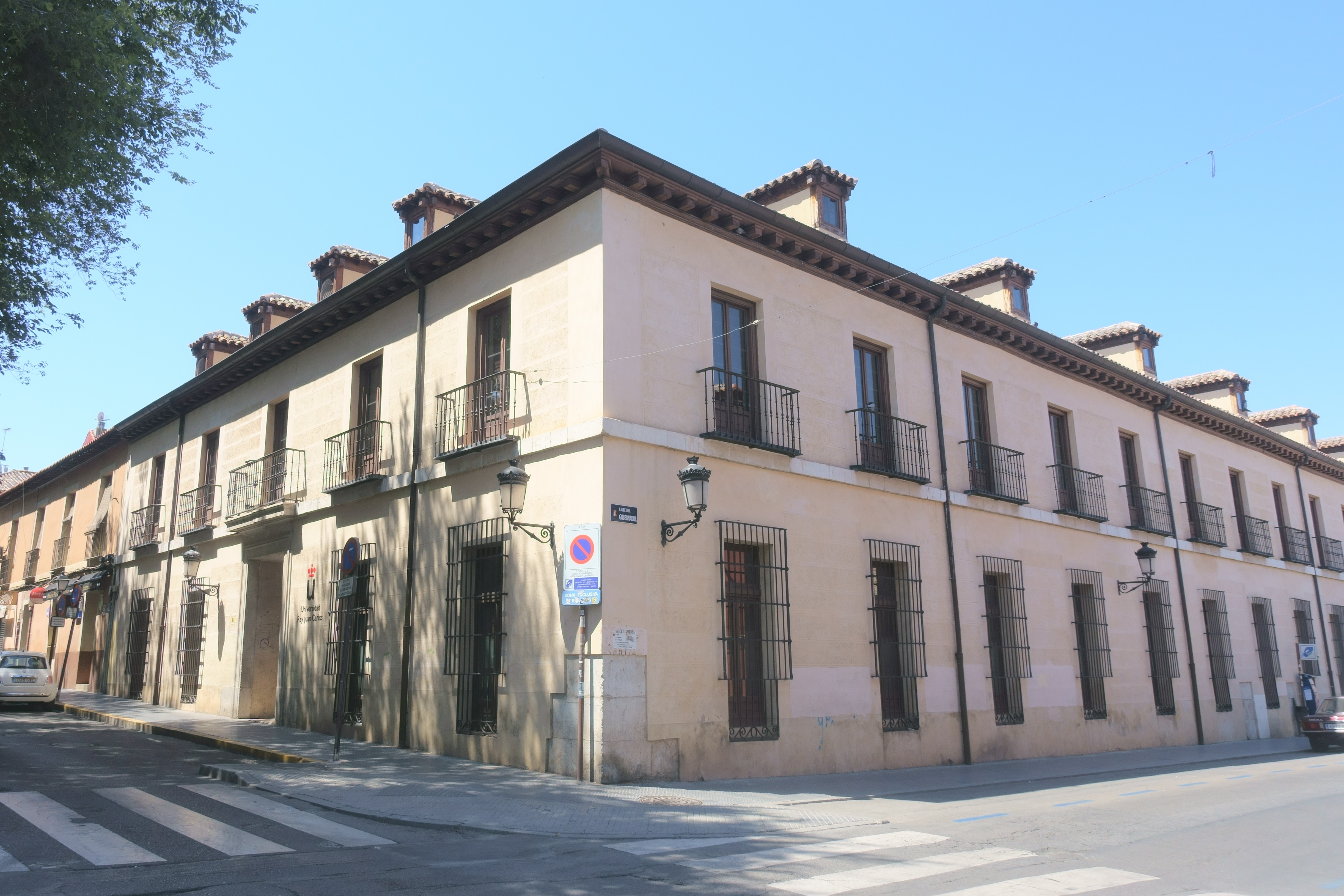 Vista general de la Casa del Gobernador, en Aranjuez (Madrid, España).